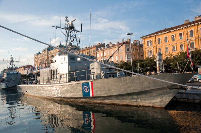 Dan HRM-a, Rijeka